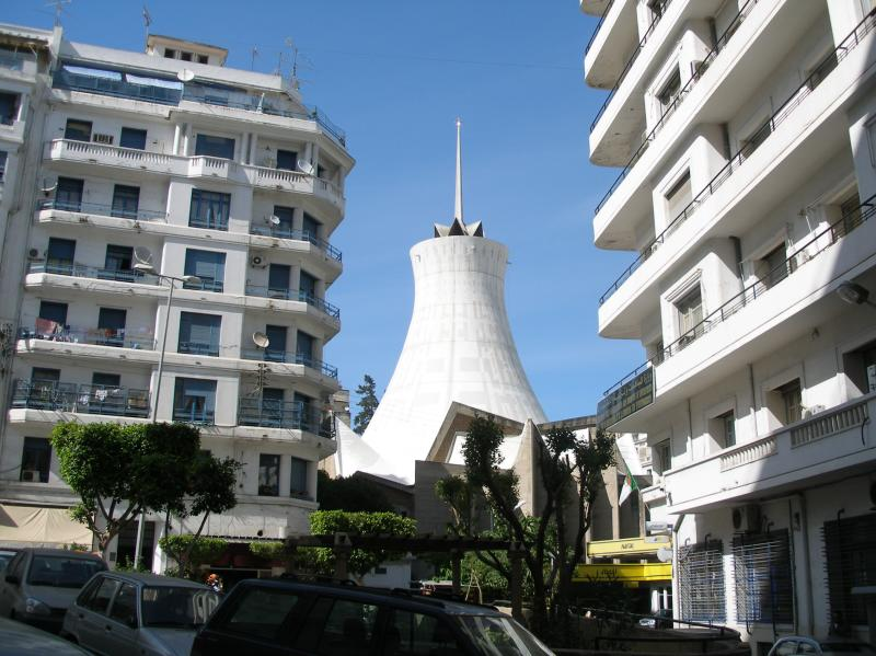 Sacré-Coeur vue depuis le rue M. Duclos